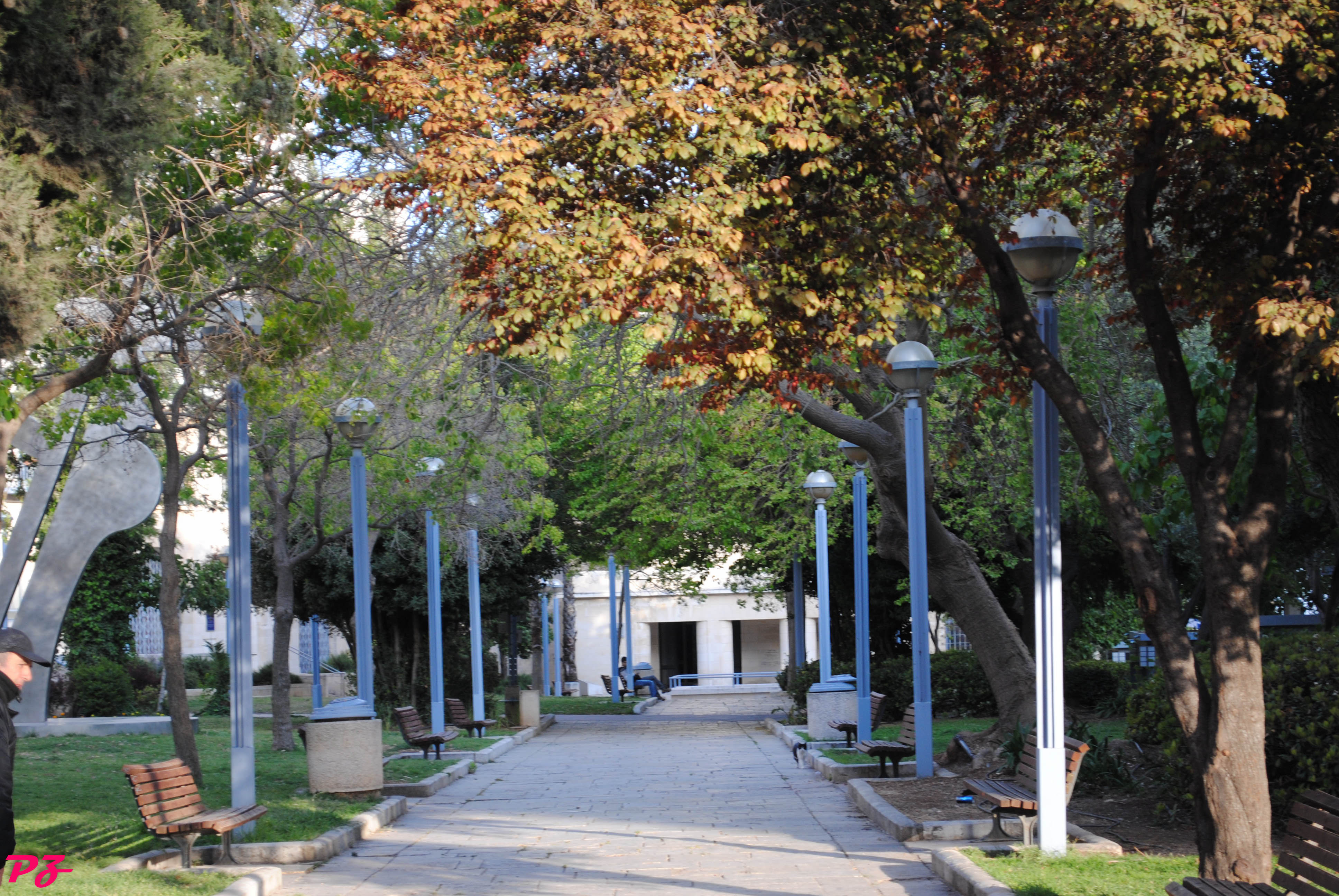 DSC_0810 Jerusalem